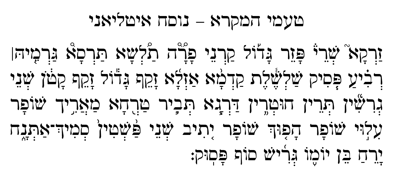 לוח זרקא של טעמי המקרא בנוסח האיטליאני.